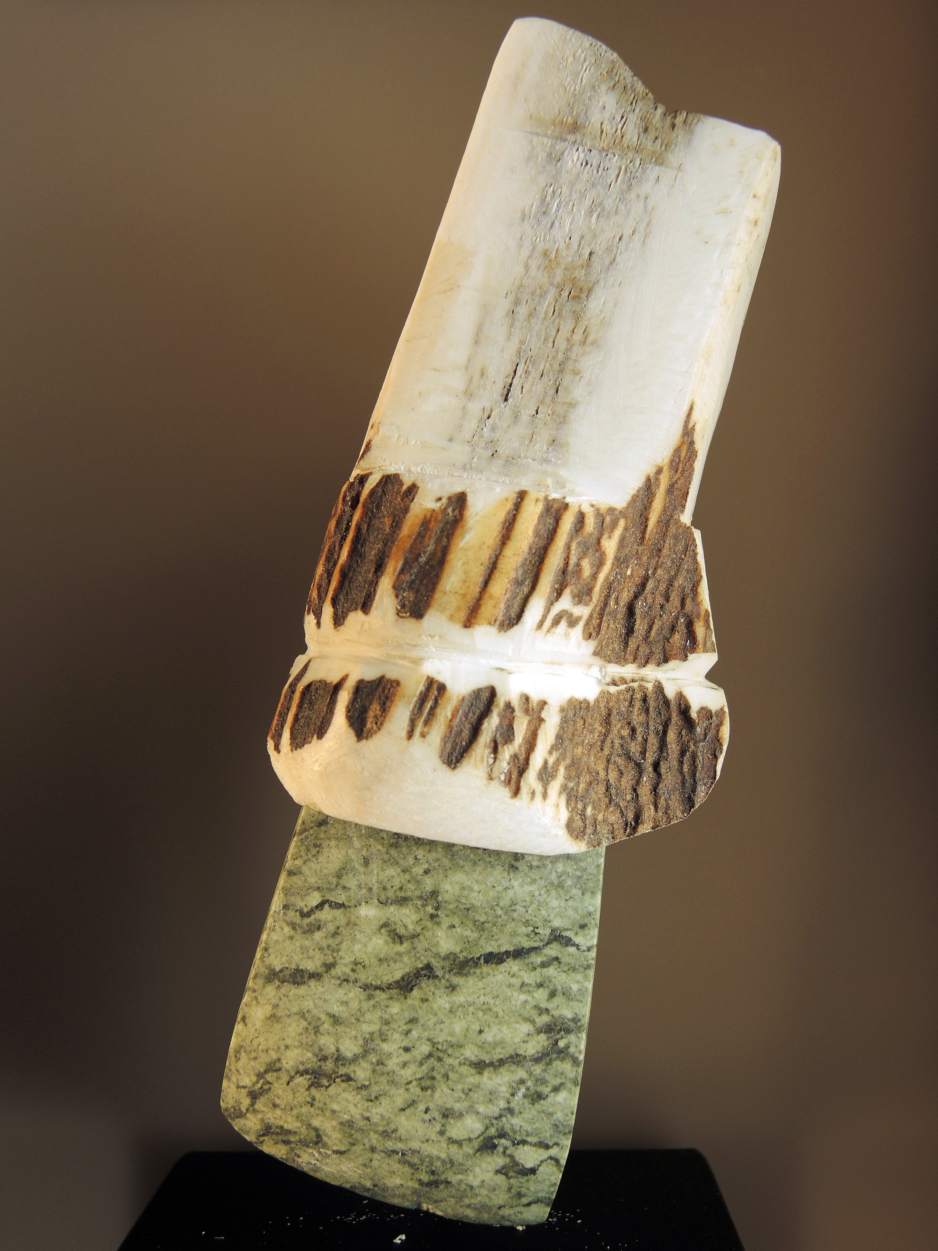 Ausstellung Archäologie im Parkhaus Opèra, Exponat aus der Grabung Parkhaus Opéra in Zürich (Switzerland) : Horgener Kultur, Steinbeil in 'Zwischenfutter' aus Hirschgeweih, aus der in der Ausstellung gezeigten Fundschicht.